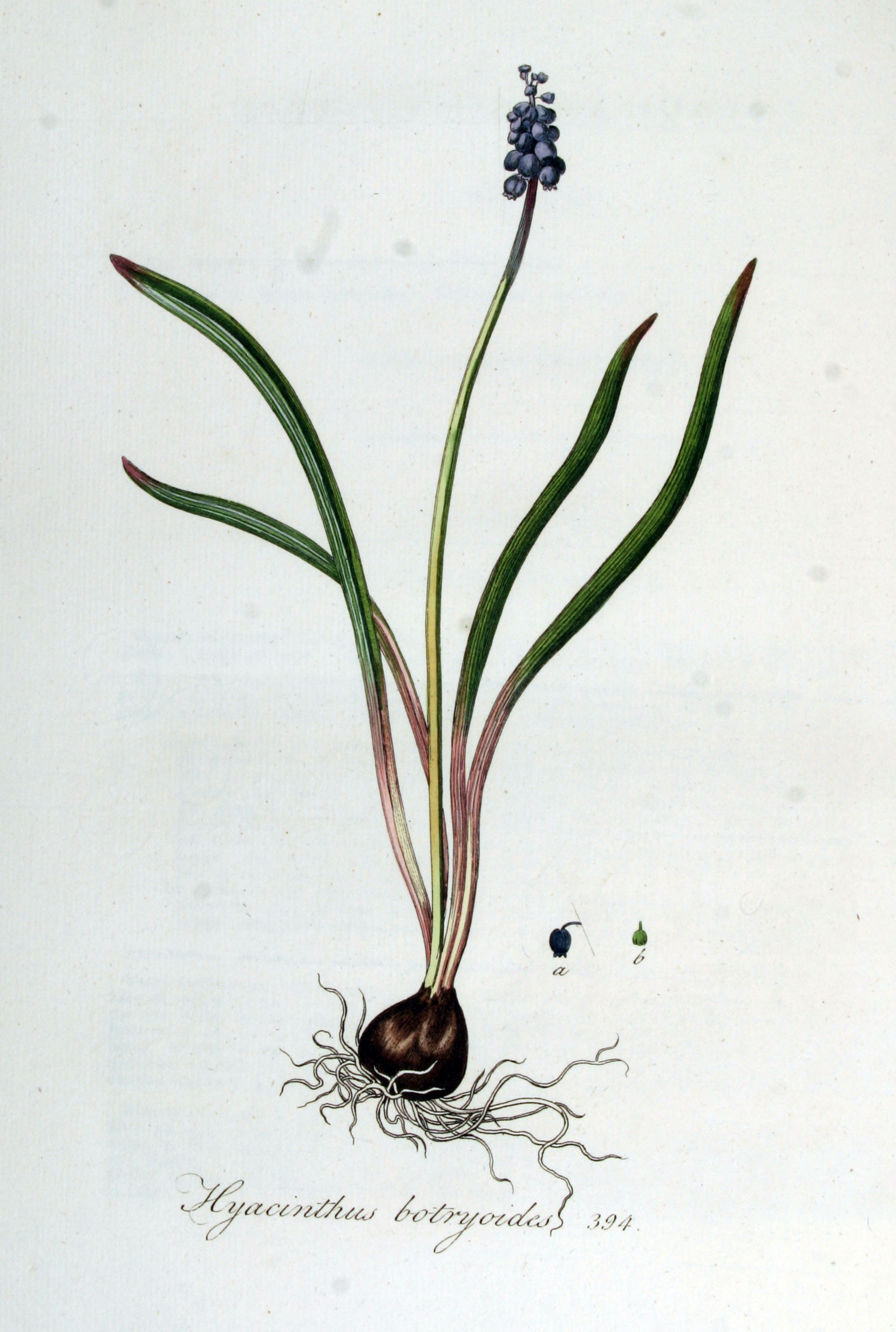 Muscari botryoides (L.) Mill. (Syn. Hyacinthus botryoides L.)